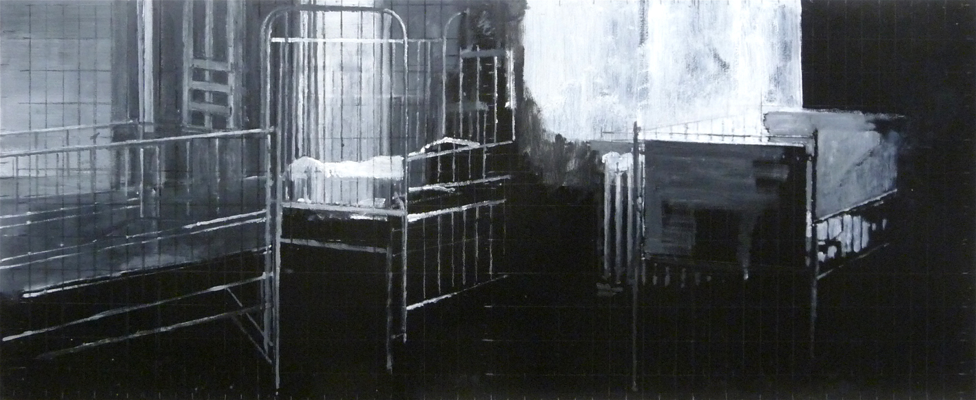 Heike Ruschmeyer, Lalelu 16, 2011, Kunstharz, Kohle und Kreide auf MDF, 55 x 133 cm